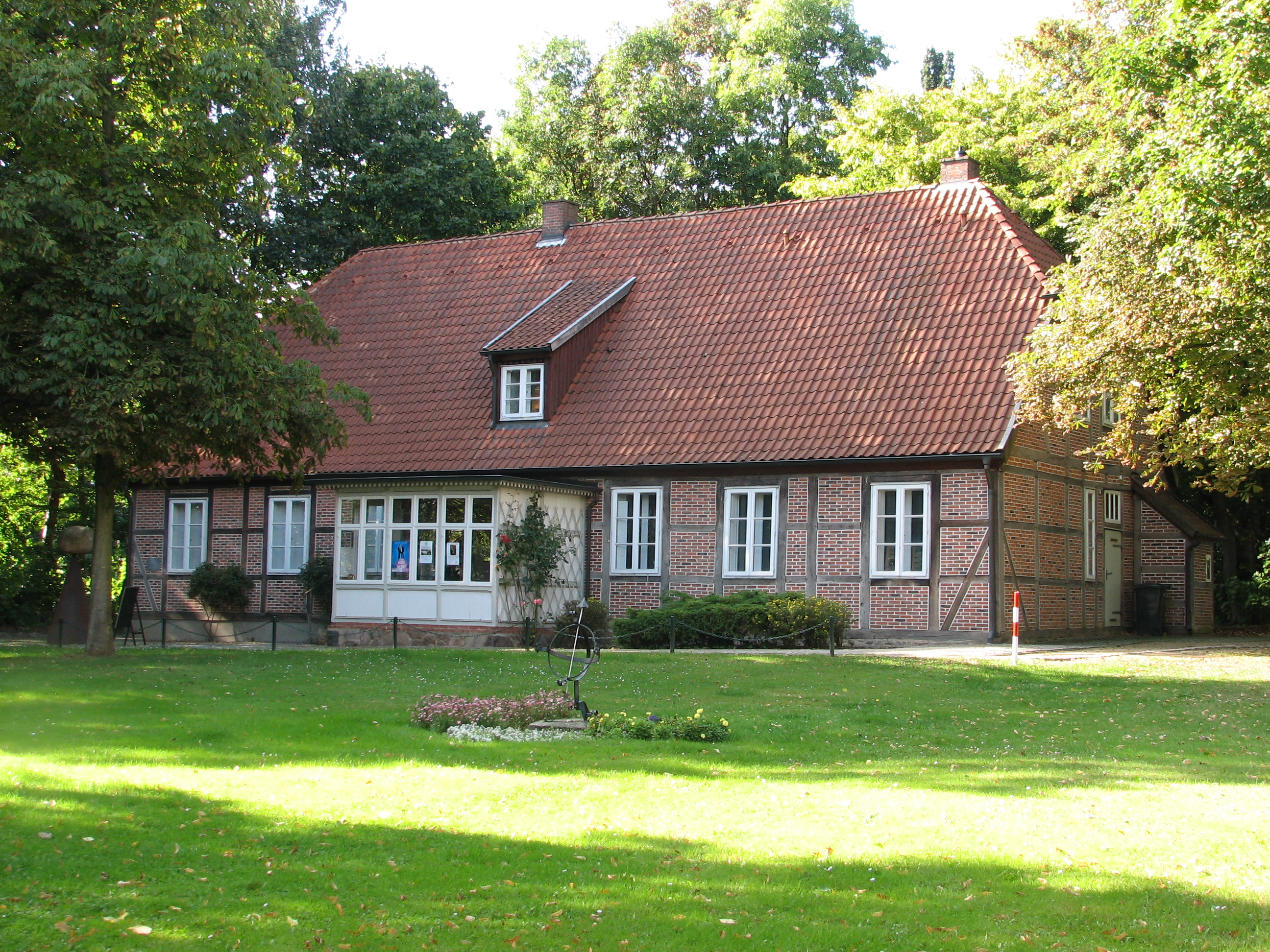 Das Amtsrichterhaus in Schwarzenbek innmitten einer Parkanlage.